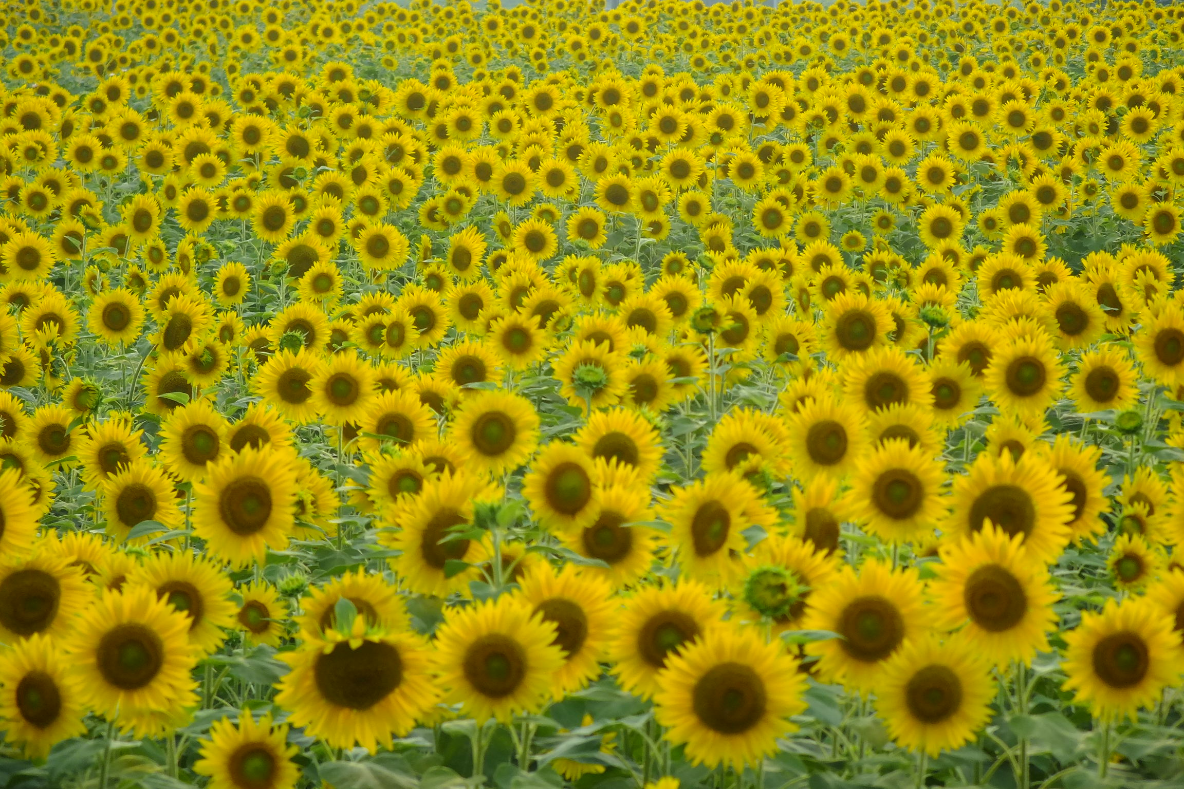 2017-07-15 Ono-himawarino-oka-park (小野市立ひまわりの丘公園)